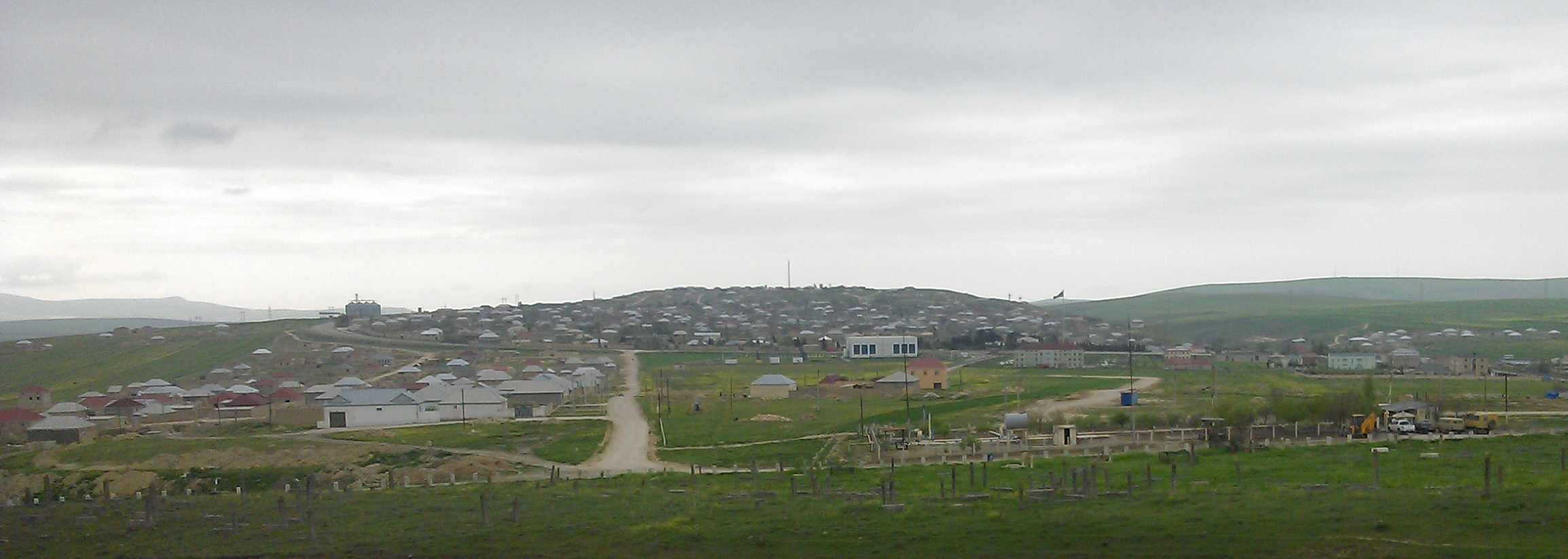 Qobustan şəhərinin bir hissəsinin görüntüsü